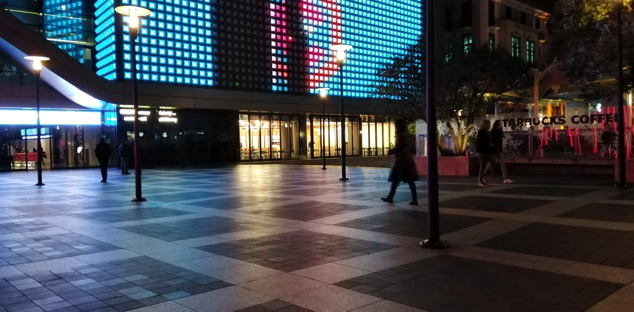 بعد اعلان حالة الطوارئ في لبنان اصبحت مدينة بيروت كأنها مدينة اشباح خالية من السكان